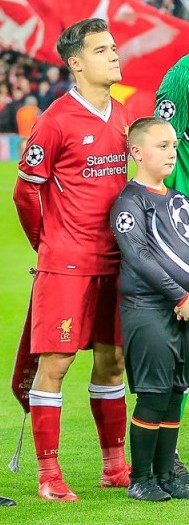 Liverpool FC